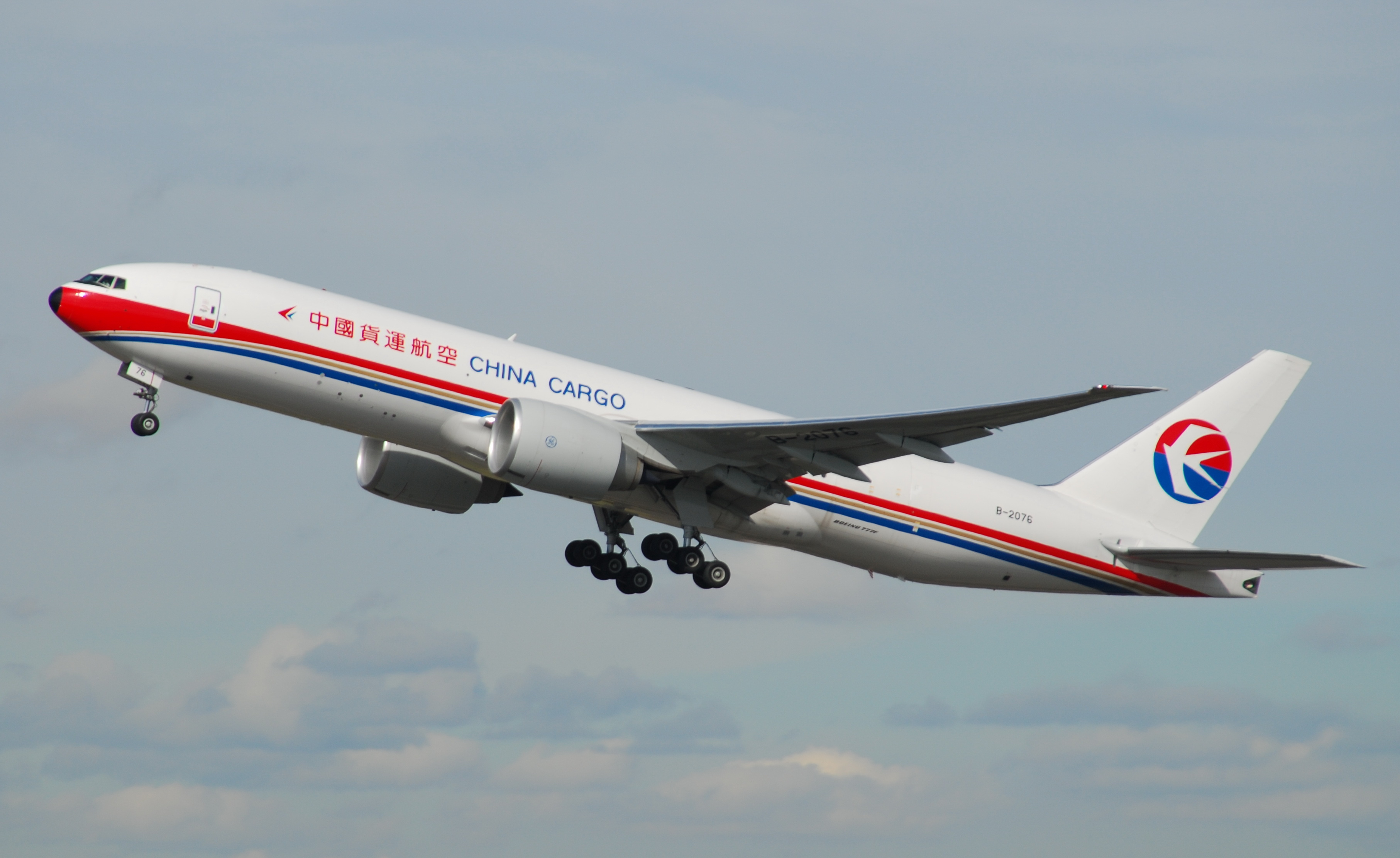 Photo prise à l'aéroport de Roissy-Charles de Gaulle (LFPG) en France. Picture take at Roissy-Charles de Gaulle Airport (LFPG) in France.